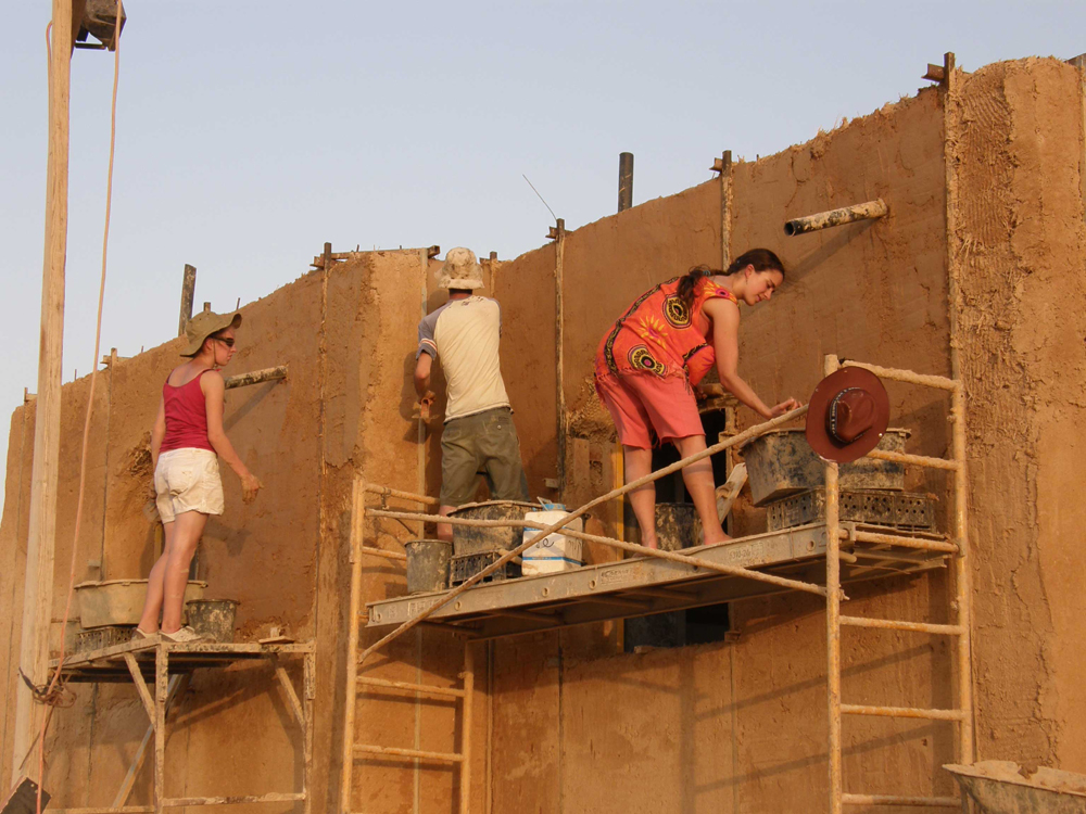 הנחת טיח בוץ על קיר של בלות קש במדרשת נאות סמדר